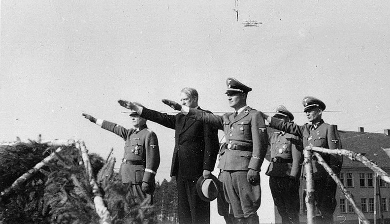 Беларуская (тарашкевіца): Відкун Квісьлінг (у цэнтры) і Фэлікс Гартман (праваруч ад Квісьлінга)